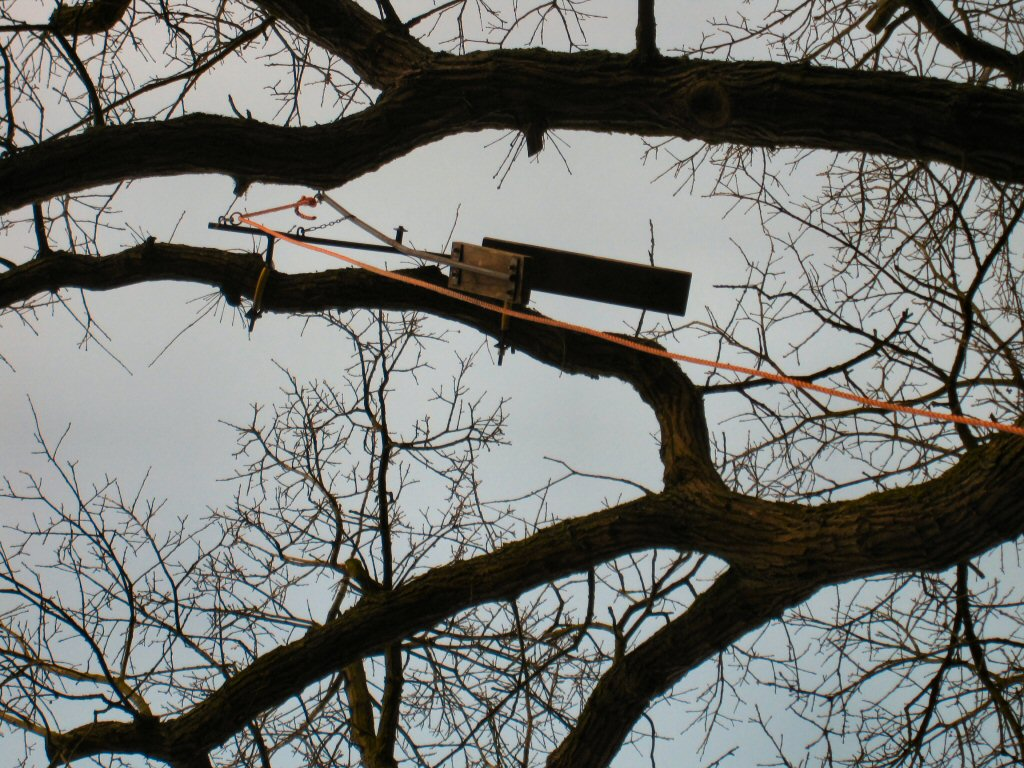 Beispiel einer Krähenklatsche, gesehen am 13.03.2009 in Jever